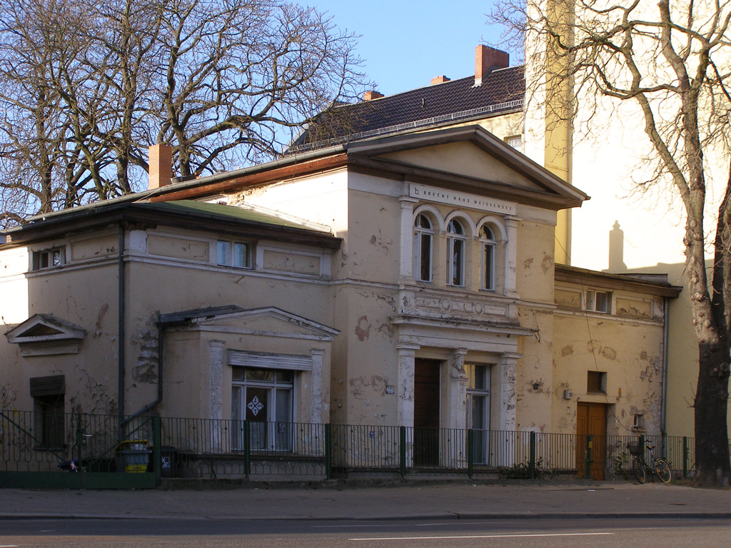 Brecht-Haus in Berlin-Weißensee